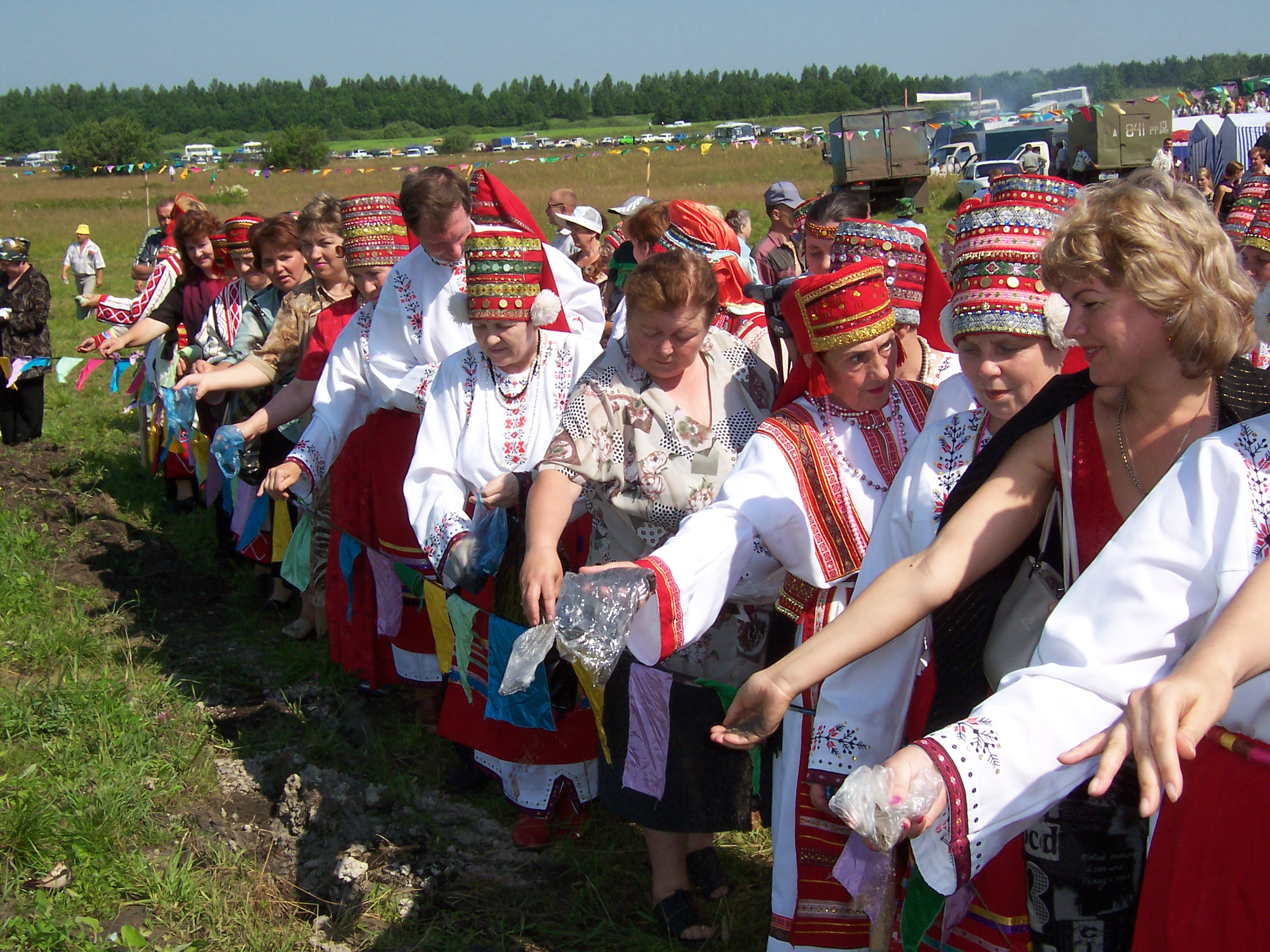 Раськень Озкс, Обряд обновления маара (посыпание землей)